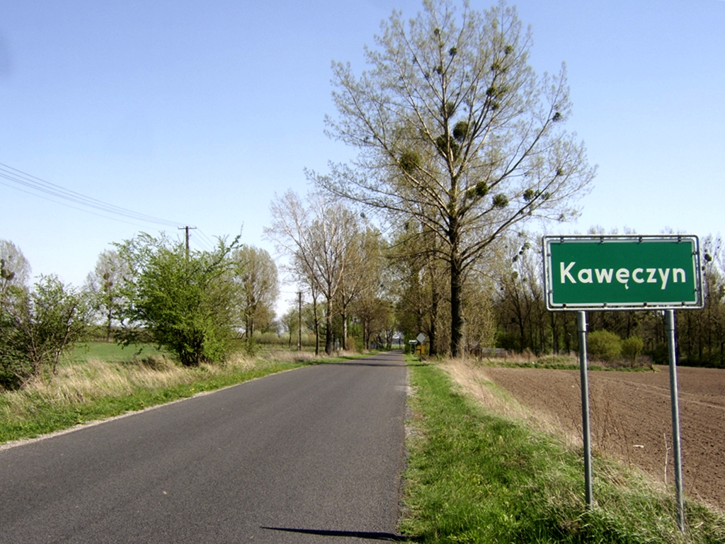 Wieś Kawęczyn